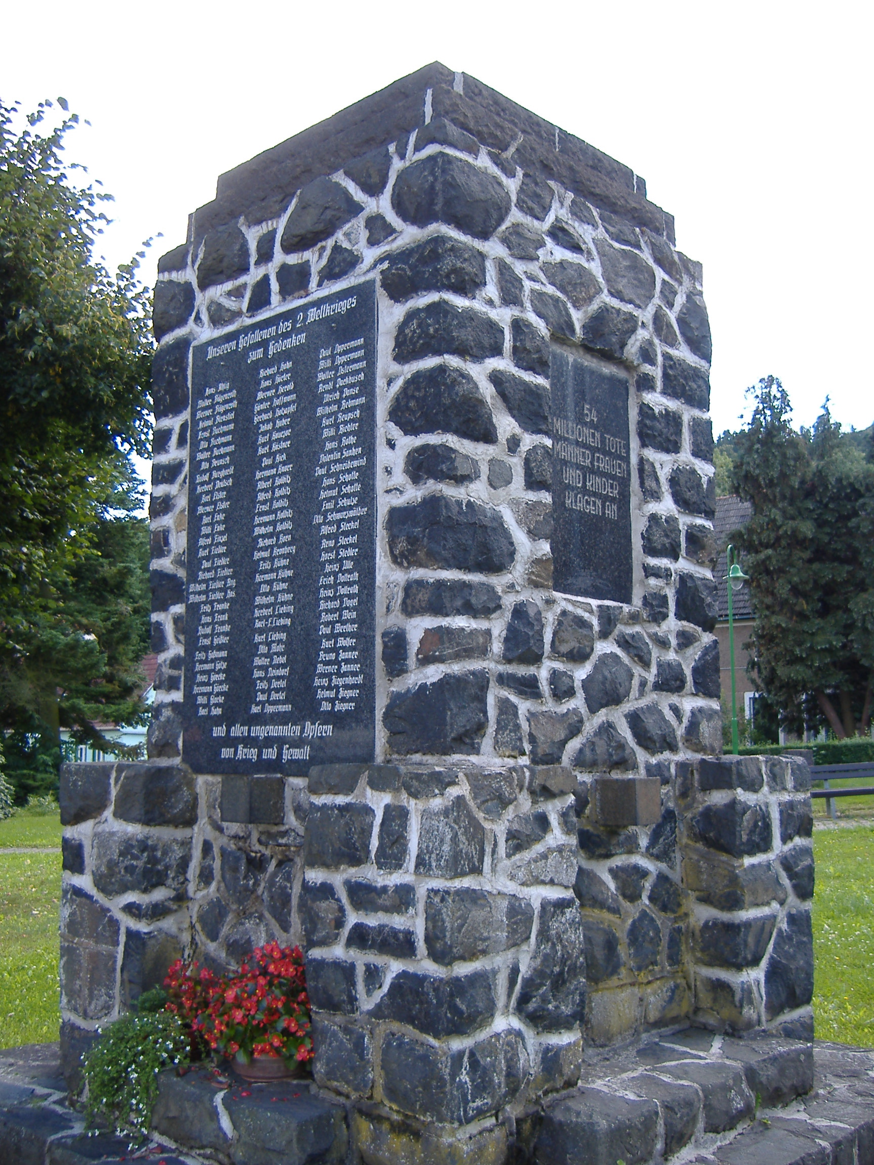 Mahnmal für die Opfer des 2. Weltkrieges in Wippra (Sachsen-Anhalt)